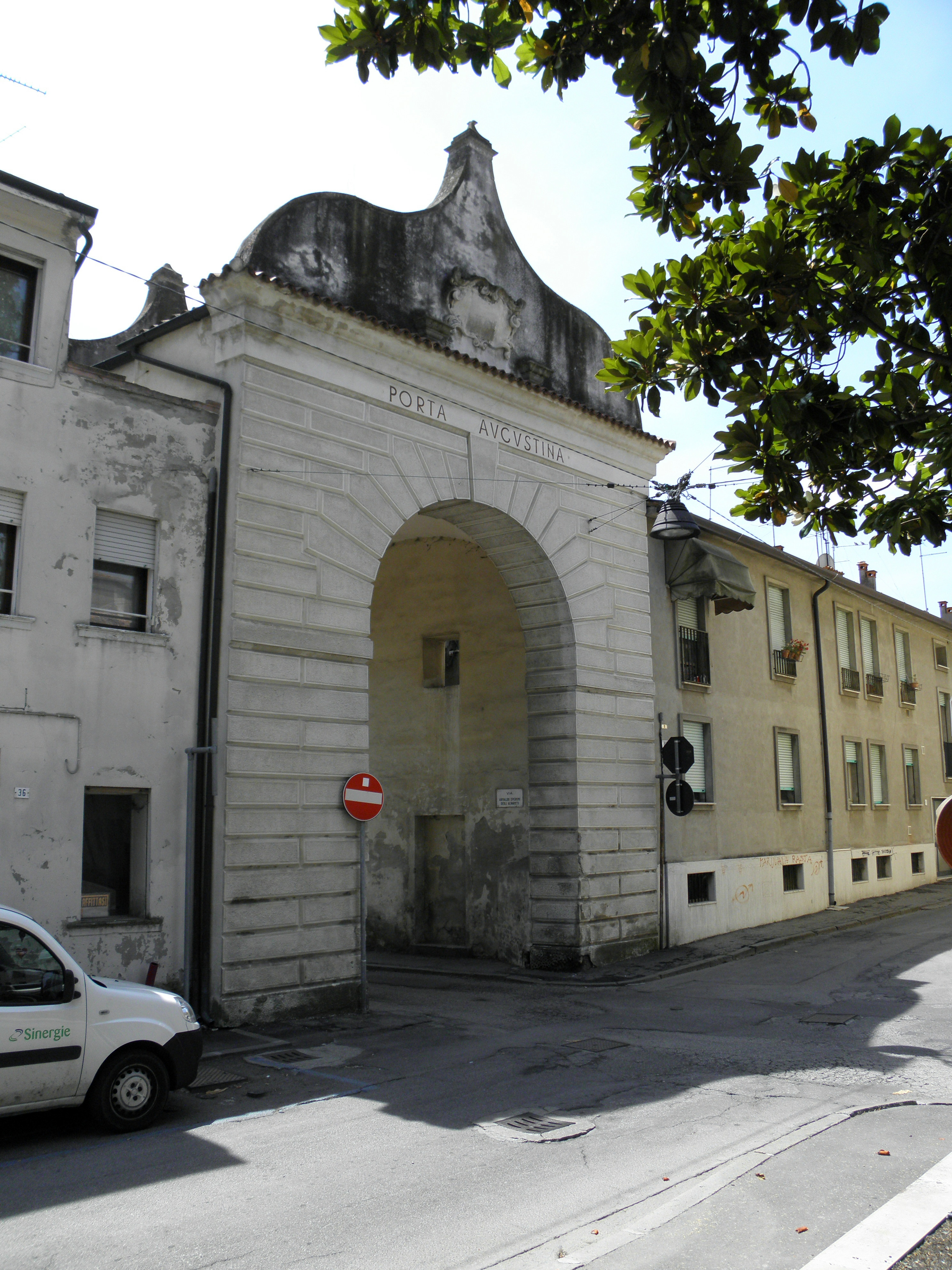 Rovigo: la settecentesca Porta Sant'Agostino, vista dall'interno della quasi scomparsa cinta muraria della città da Via Alessandro Casalini.